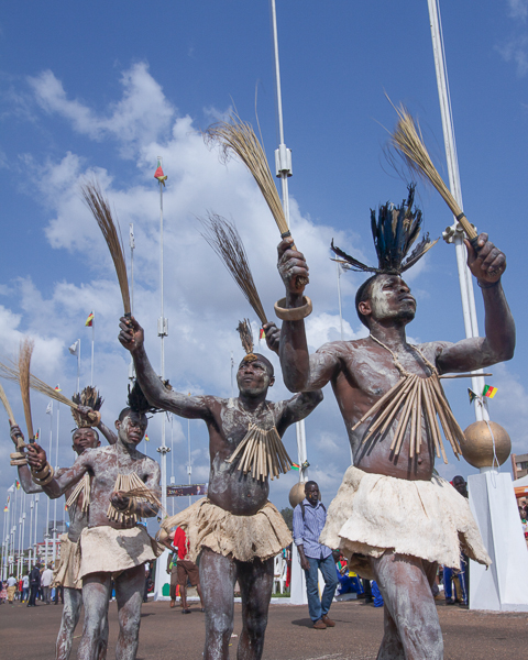 Avant d'entrée en scène, les danseurs lèvent leurs chasse-mouches vers le ciel (Danse BÉTI MINKEN MI MIMBON).